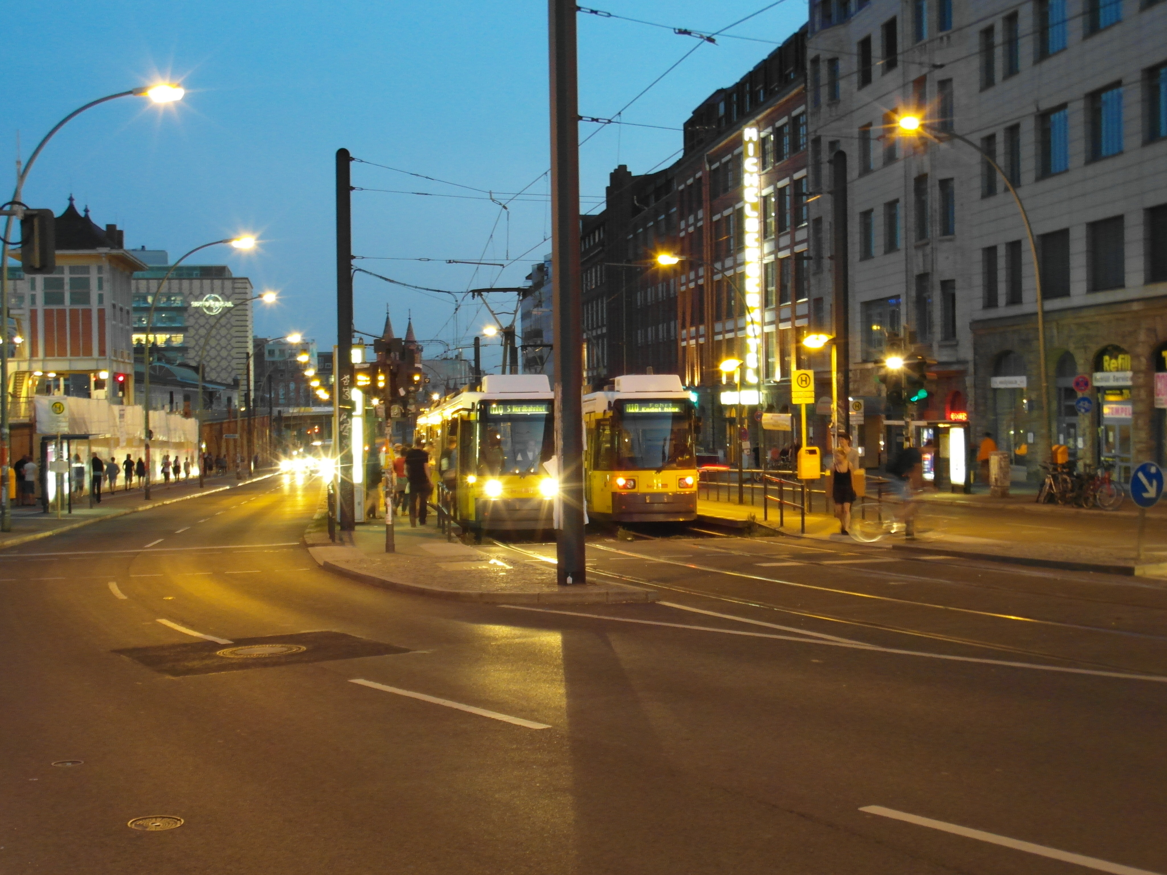 Berlin - U-Bahnhof Warschauer Straße - Haltestelle der Straßenbahn - Linie M10